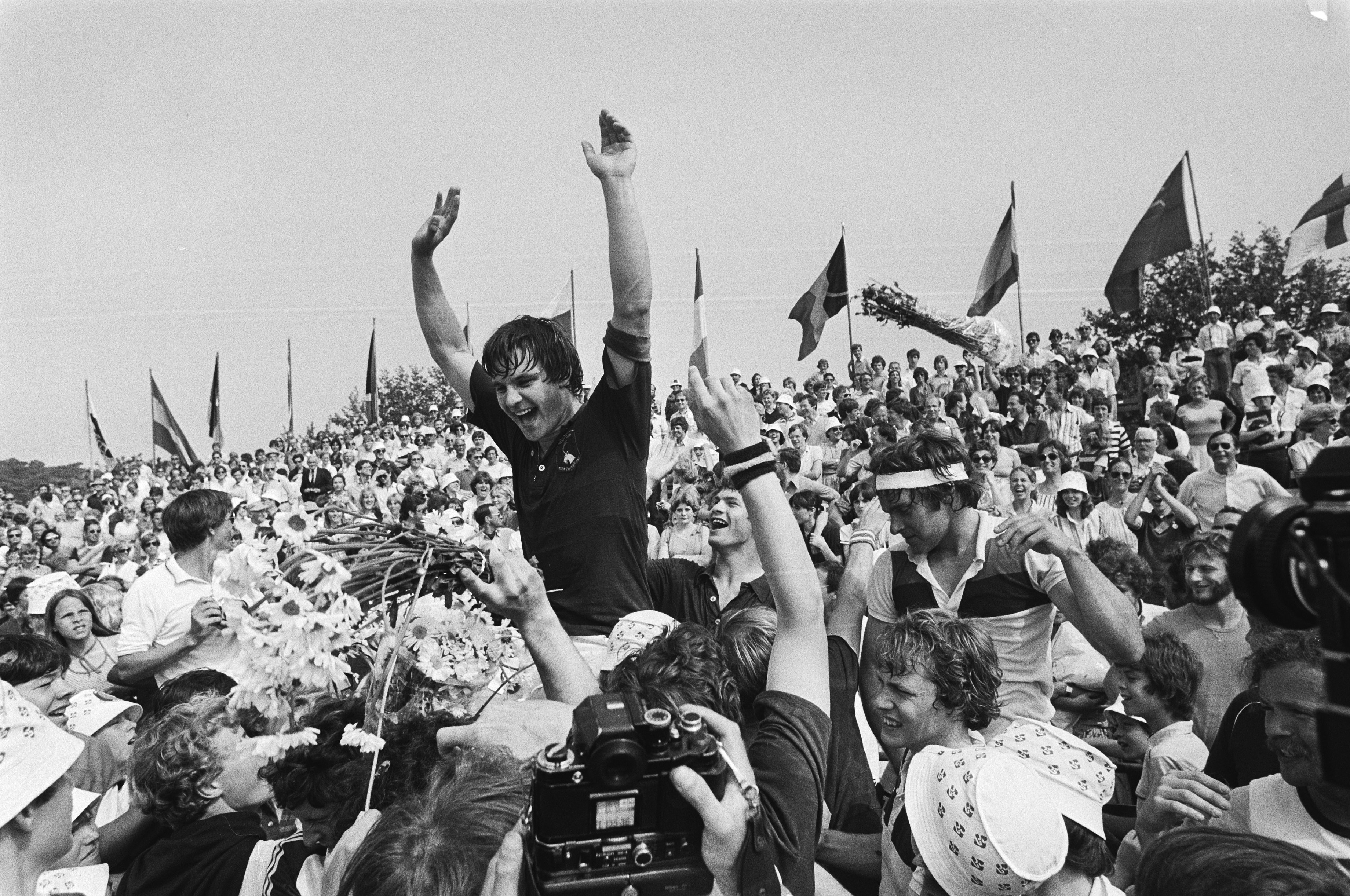 Collectie / Archief : Fotocollectie Anefo Reportage / Serie : Europa Cup hockey heren; Klein Zwitserland (HCKZ) tegen Polo Barcelona 2-1 Beschrijving : Ties Kruize op de schouders na afloop Datum : 4 juni 1979 Trefwoorden : hockey, sport Persoonsnaam : Kruize, Ties Instellingsnaam : Europa Cup Fotograaf : Croes, Rob C. / Anefo Auteursrechthebbende : Nationaal Archief Materiaalsoort : Negatief (zwart/wit) Nummer archiefinventaris : bekijk toegang 2.24.01.05 Bestanddeelnummer : 930-2959